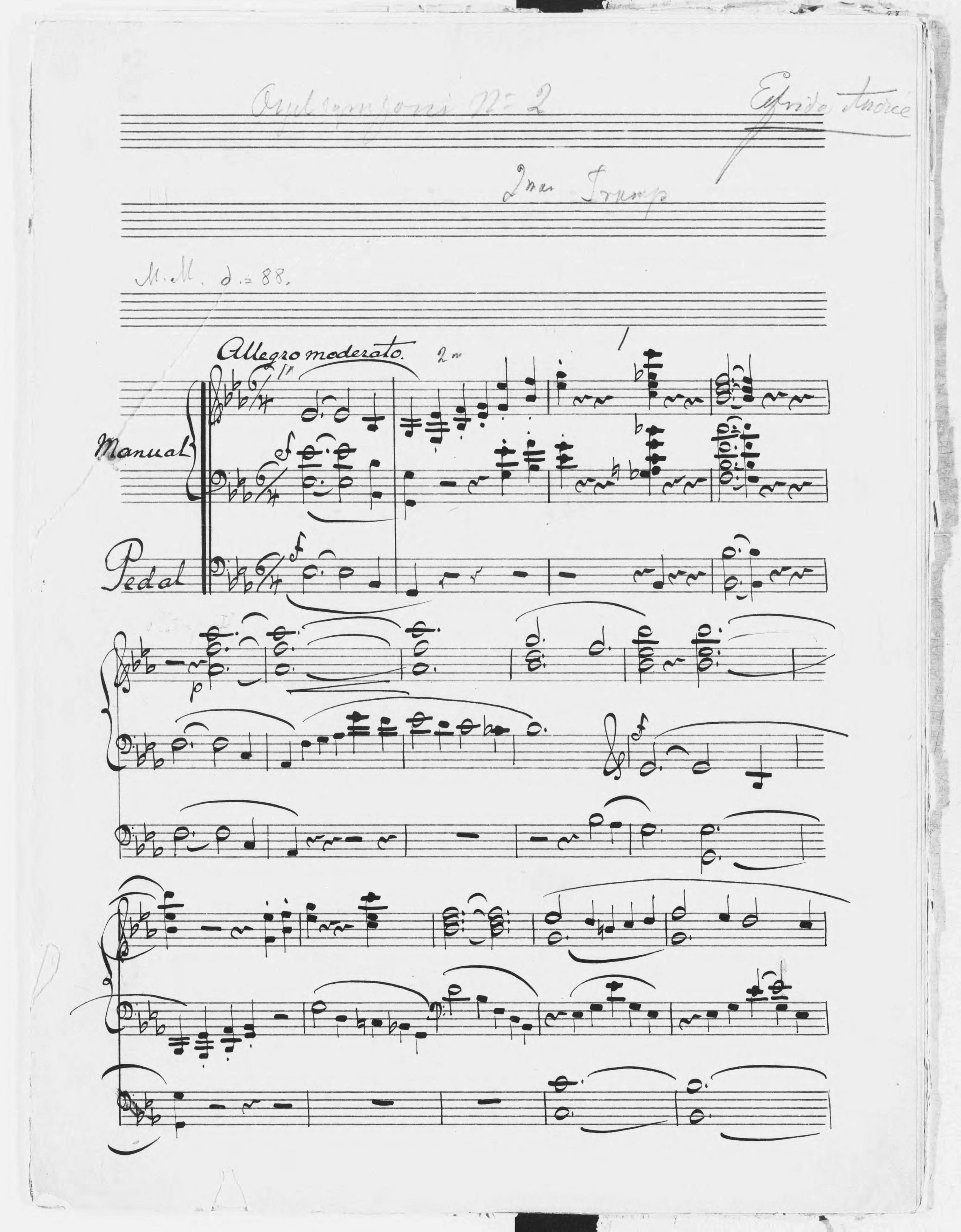 Orgelstämma i autograf av Elfrida Andrée. Början av sats 1: Allegro moderato. Orgelsymfoni nr 2 i Ess-dur för orgel och mässingsinstrument.